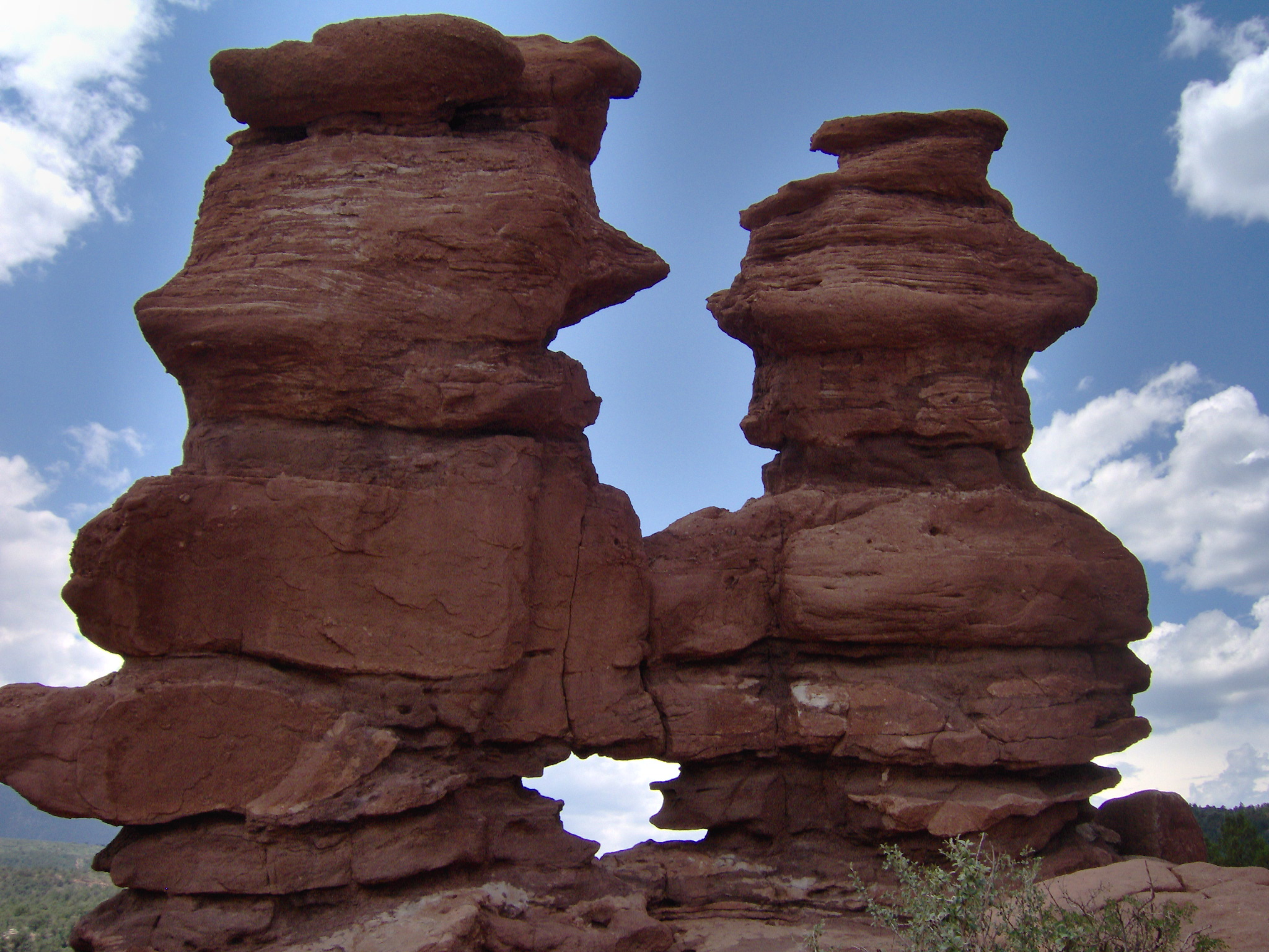 Felsformation "Siamesische Zwillinge" im Garden of the Gods bei Colorado Springs, CO